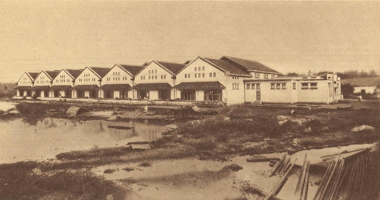 Stasiun Jakarta Gudang saat masih dibangun